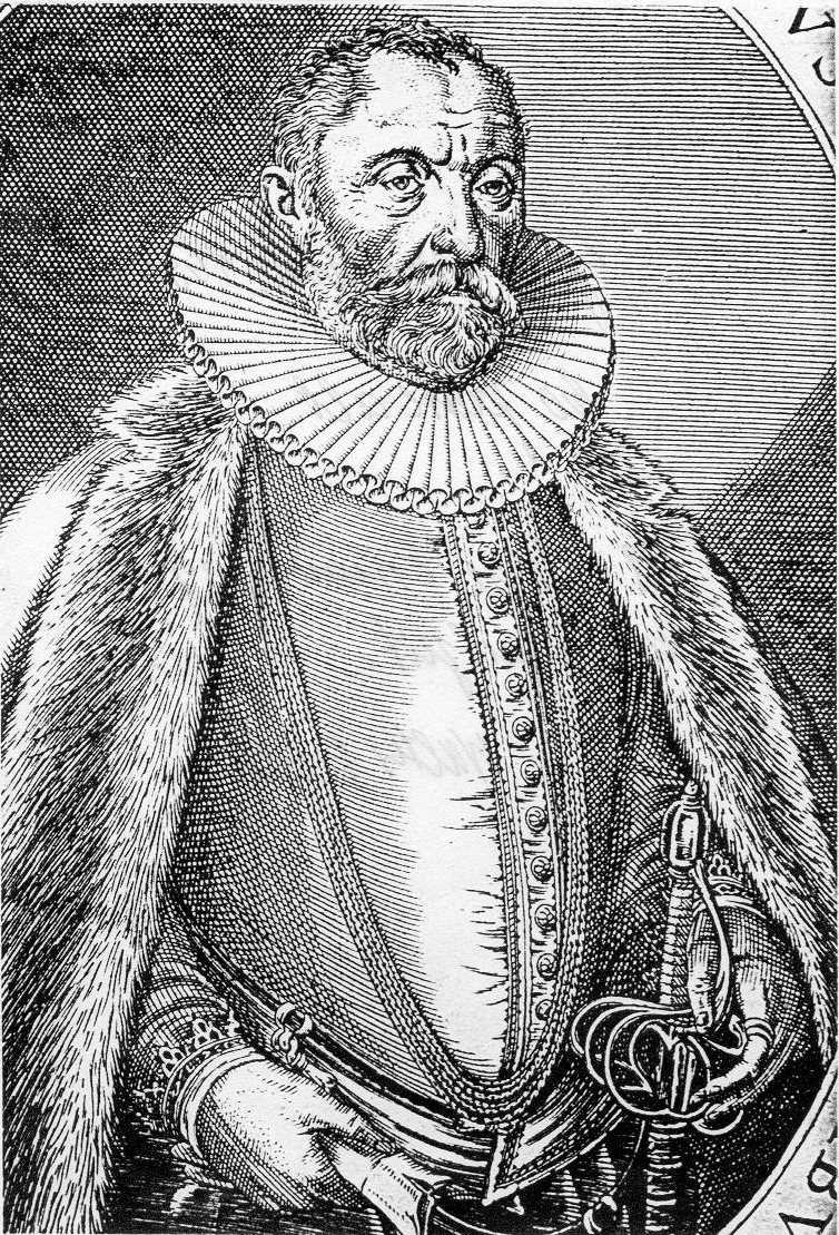 Graf Joachim von Ortenburg im Jahre 1590